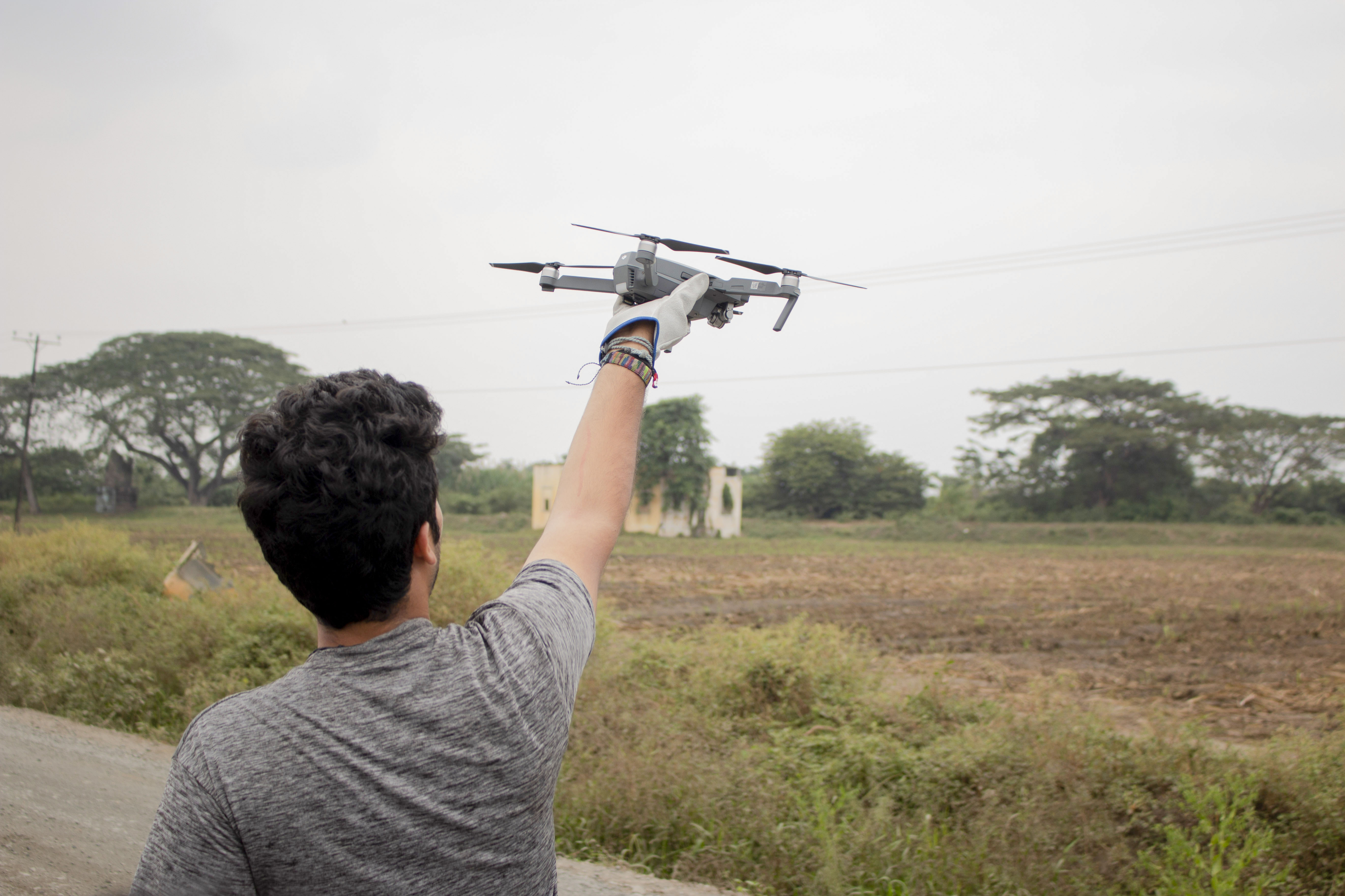 Drone con el que se rodó la película Minuto Final.